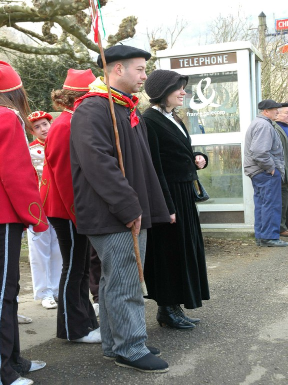 Urdiñarbeko maskaradariak Gameren egin zuten agerraldia 2006ko otsailaren 5ean. Irudian laboraria eta laborarisa.